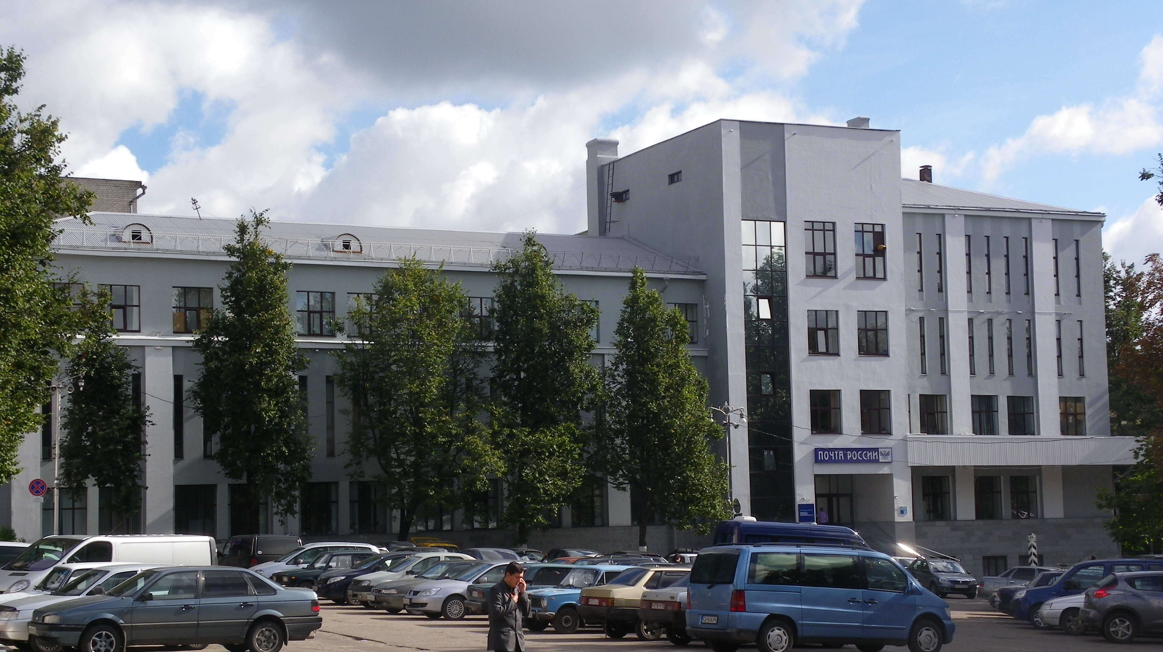 Брянск, площадь Карла Маркса (Красная пл.). Здание главпочтамта